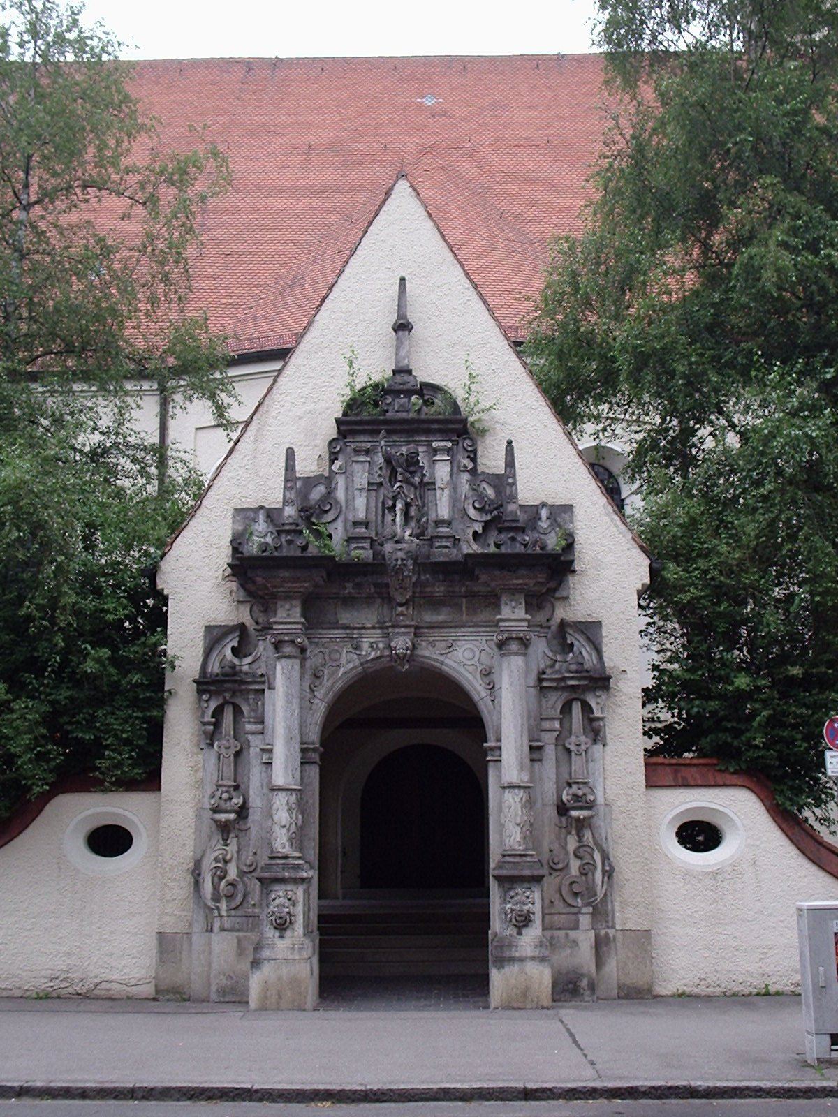 St. Johann Baptist Solln Südportal. Das Portal ist eine Steinmetzarbeit aus dem späten 19. Jahrhundert und stellt eine Kopie des manieristischen Kirchenportals des Klosters Tückelhausen dar. Der Einbau in die neue Pfarrkirche war eine Bedingung des Architektenwettbewerbs.